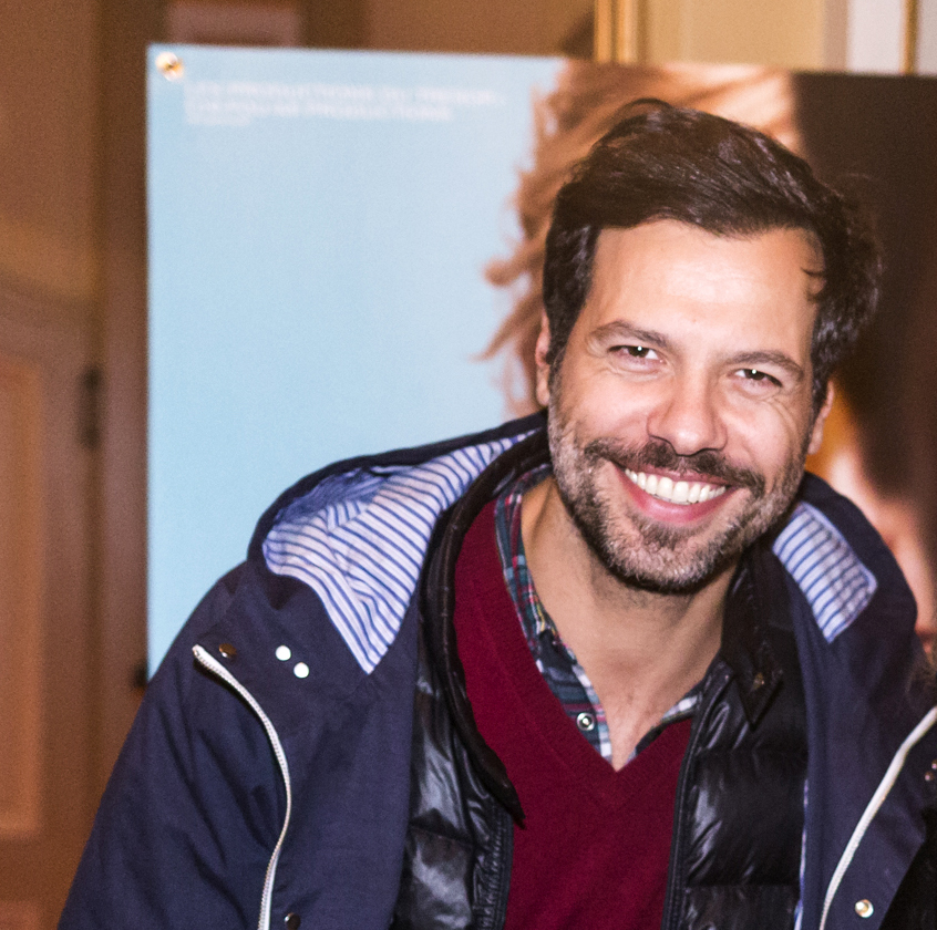 Laurent Lafitte Cinemania 2014